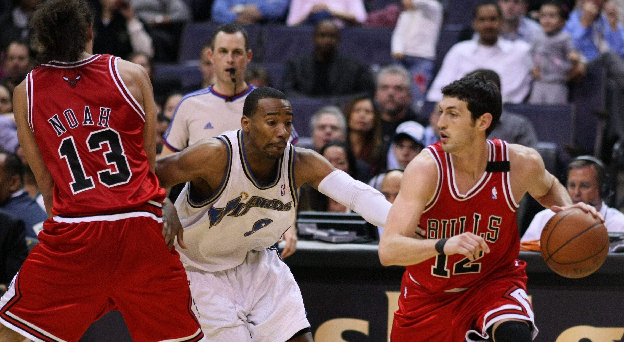 Kirk Hinrich